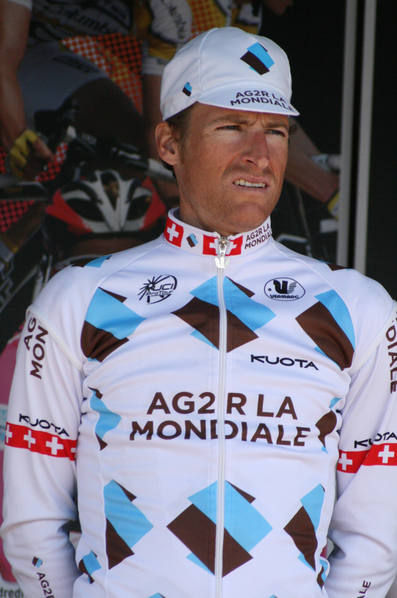 Martin Elmiger lors de la présentation des équipes des 4 jours de Dunkerque